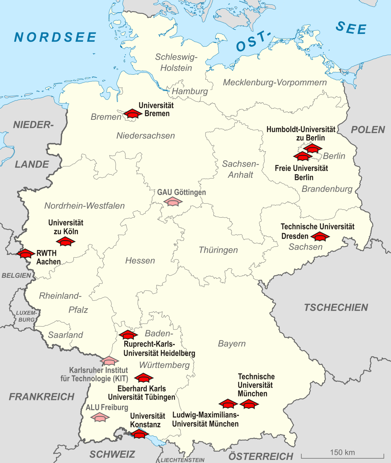 Eliteuniversitäten in Deutschland, Stand: Juni 2012